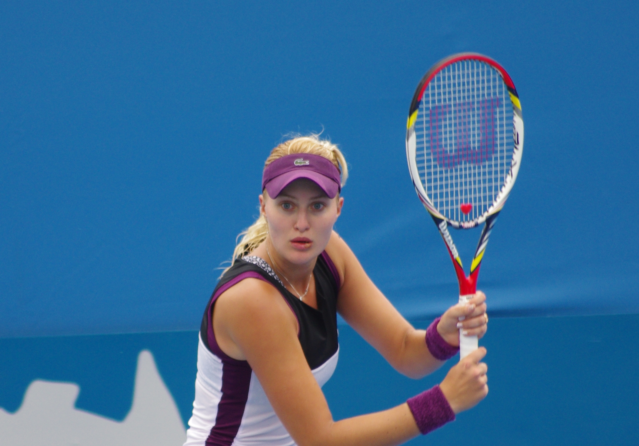 Kristina Mladenovic's backhand.